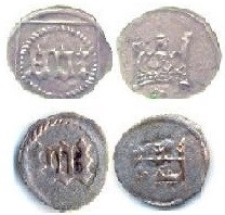 Abgebildet ist je ein Katterfinken der älteren und der späteren Form mit Vor- und Rückseite. Erstere hat um den Schnurring noch eine quatratische Einfassung. Die spätere Form wurde auf etwas kleinere Ronden geprägt.